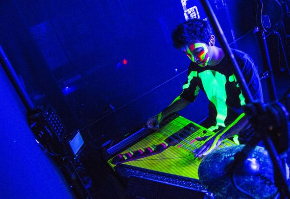 Cette image montre un des musiciens présent sur la scene des Blue Man.